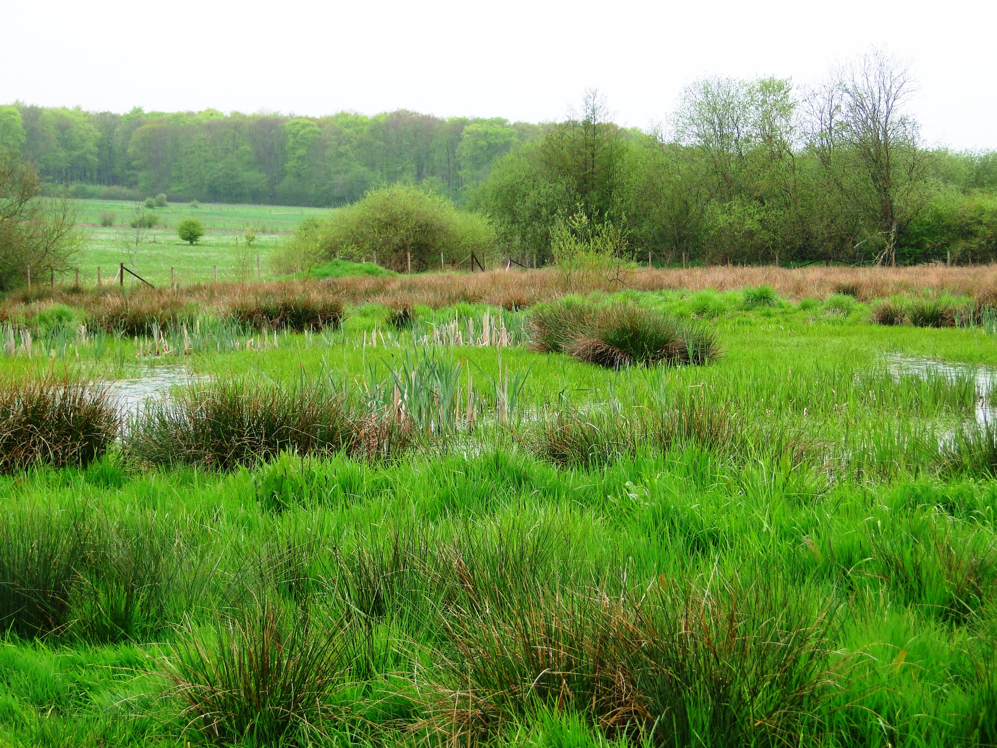 D'Nëmemswiss, e Fiichtgebitt an der Gemeng Bartreng]